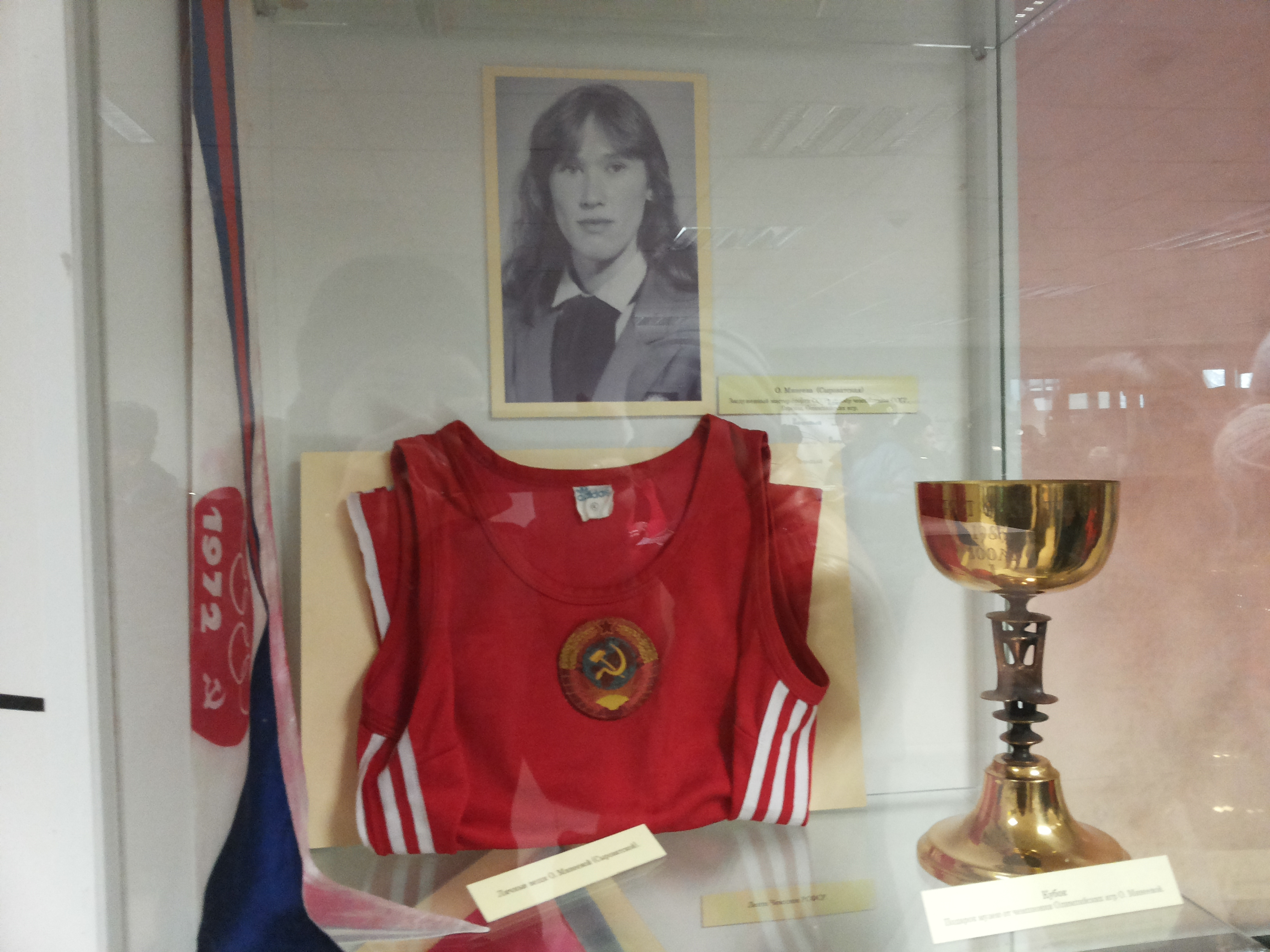 Музей истории спорта Центрального стадиона (Екатеринбург)